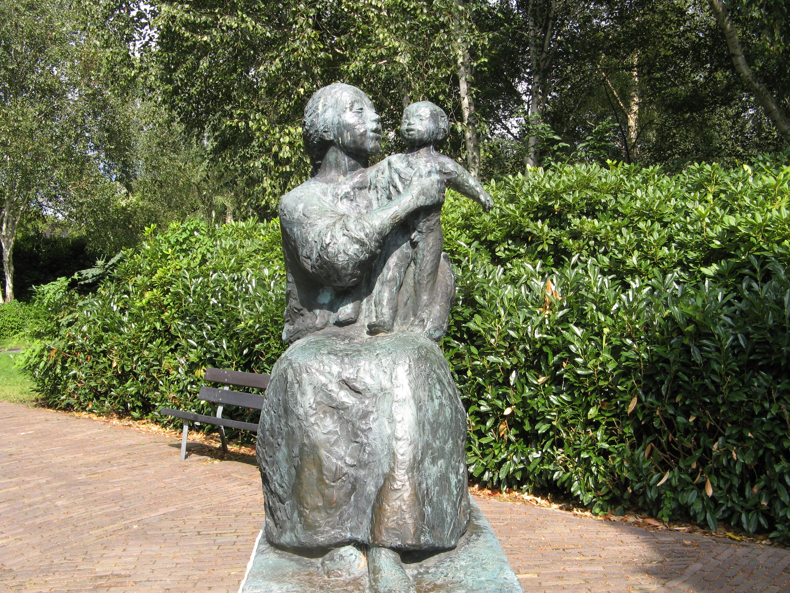 Sculpture moeder en kind (1971) by Gerarda Rueter in Amsterdam/The Netherlands